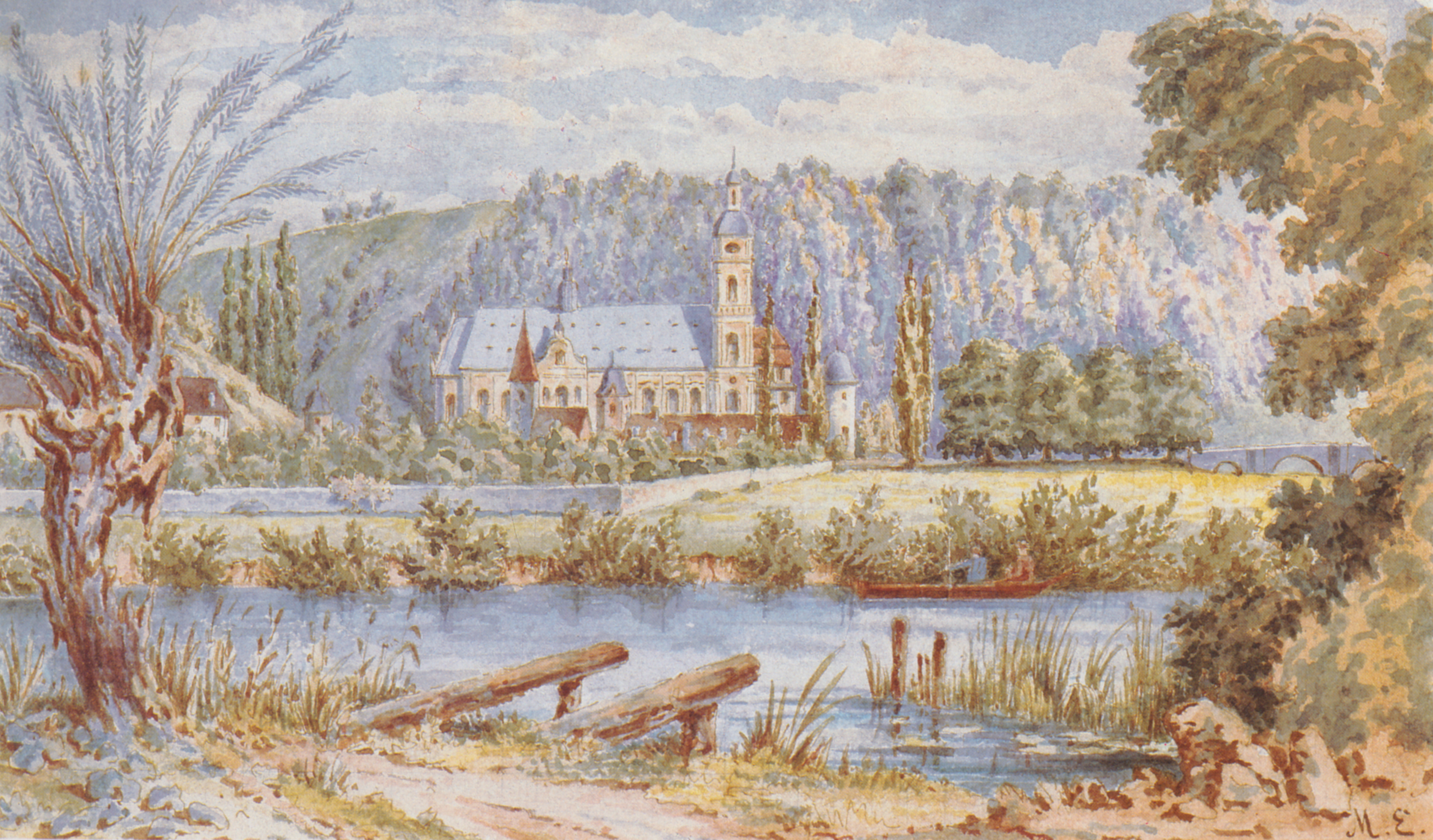 Klosterkirche Schöntal, Ansicht von Norden, Zeichnung von Max Eyth 1856